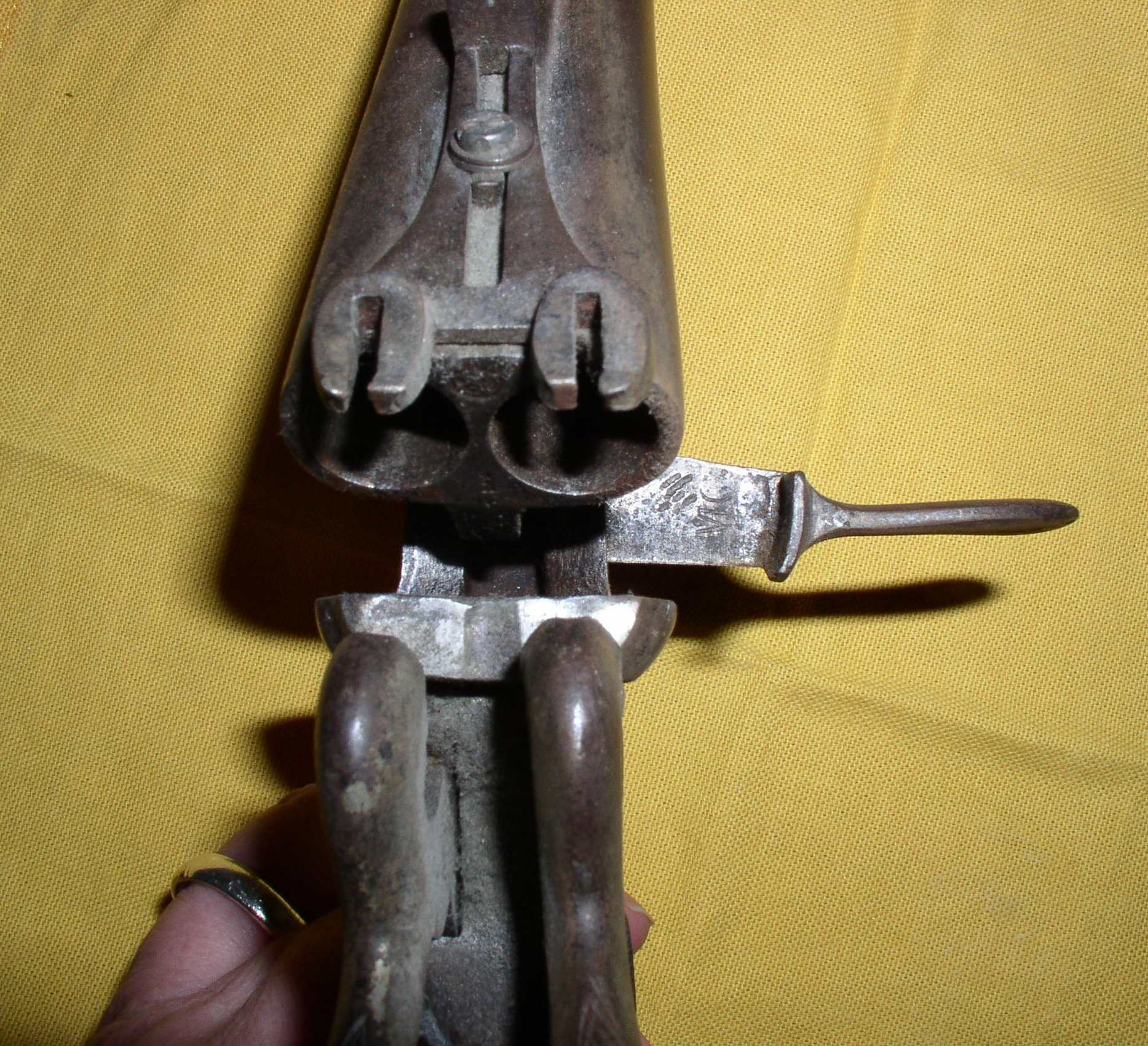 Detail einer linkshändigen Reiterpistole für Stiftpatronen.